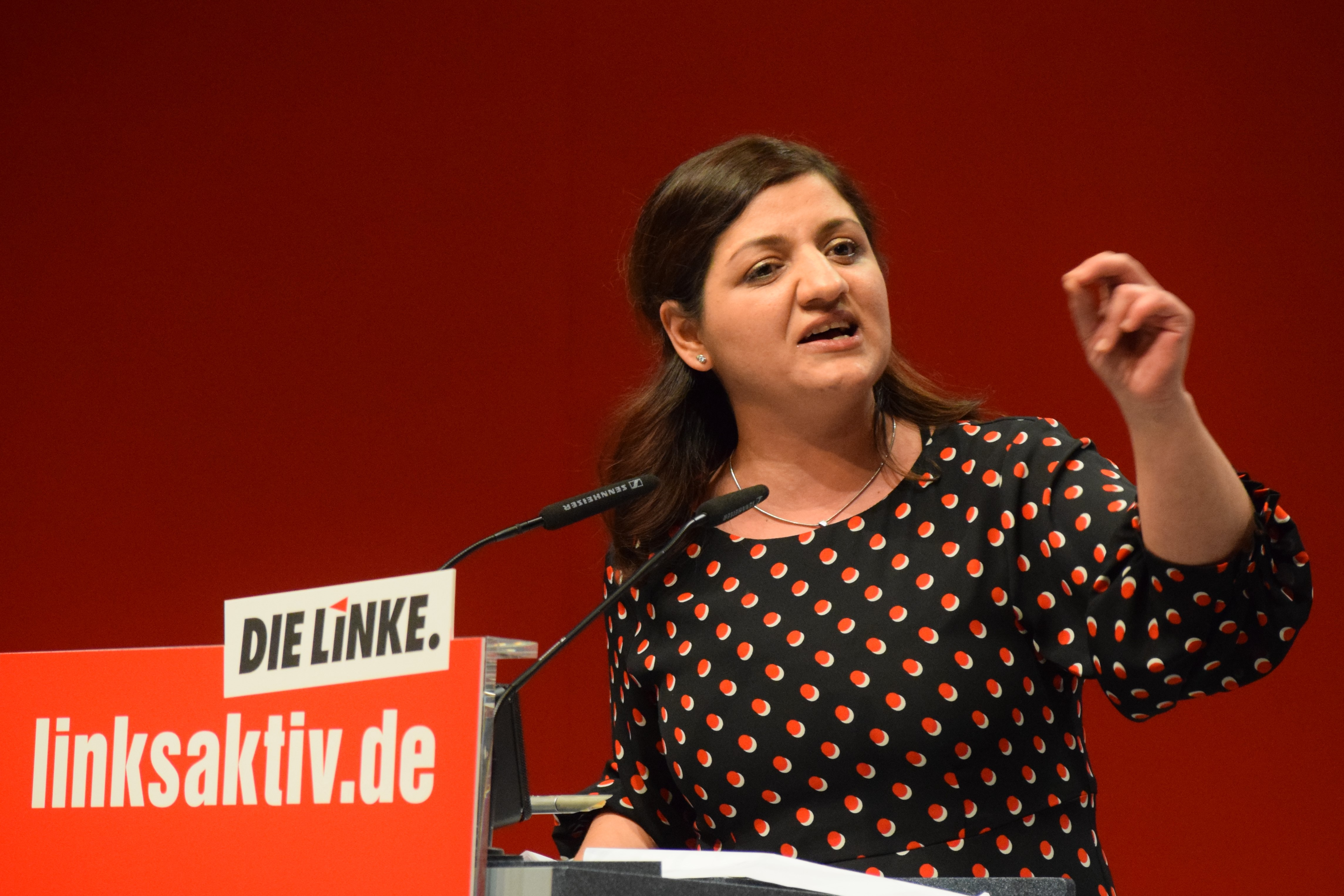 Die Spitzenkandidatin Özlem Demirel auf dem Parteitag der Linkspartei in Bonn. 2. Tagung des 6. Parteitages der Partei DIE LINKE, 22. und 23. Februar 2019, Bonn.